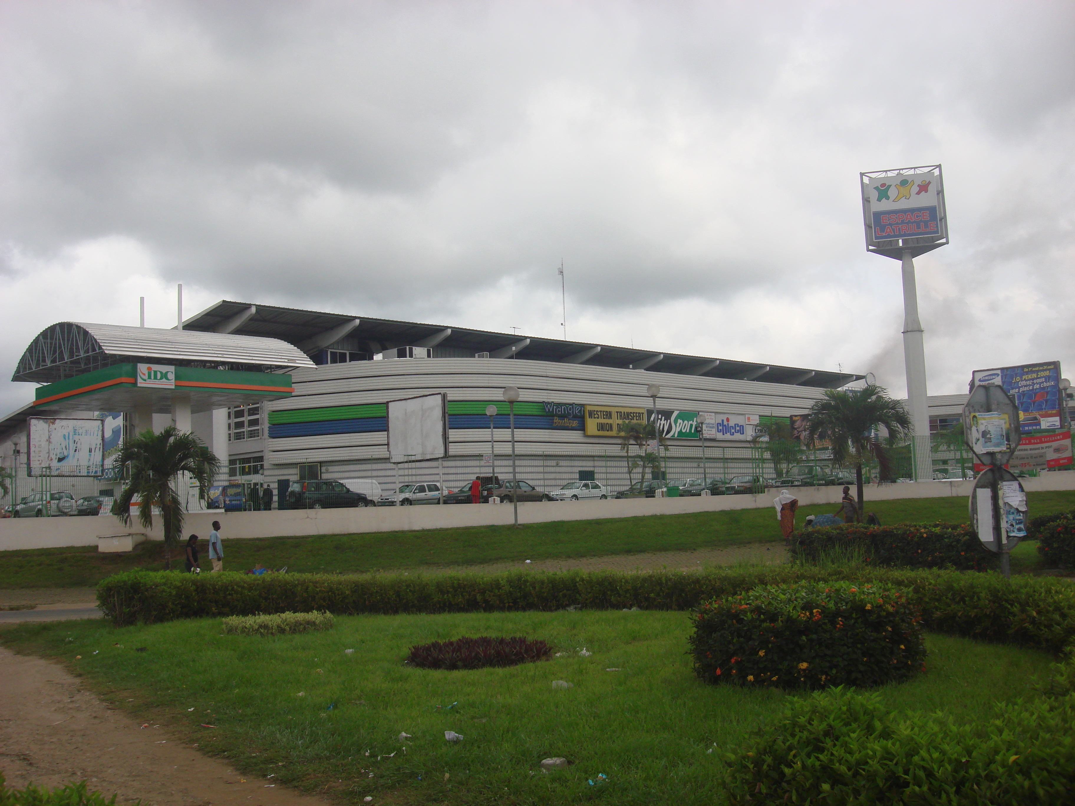 Supermarché Sococé en bordure du Boulevard Latrille à Cocody les deux plateaux à Abidjan, Côte d'Ivoire